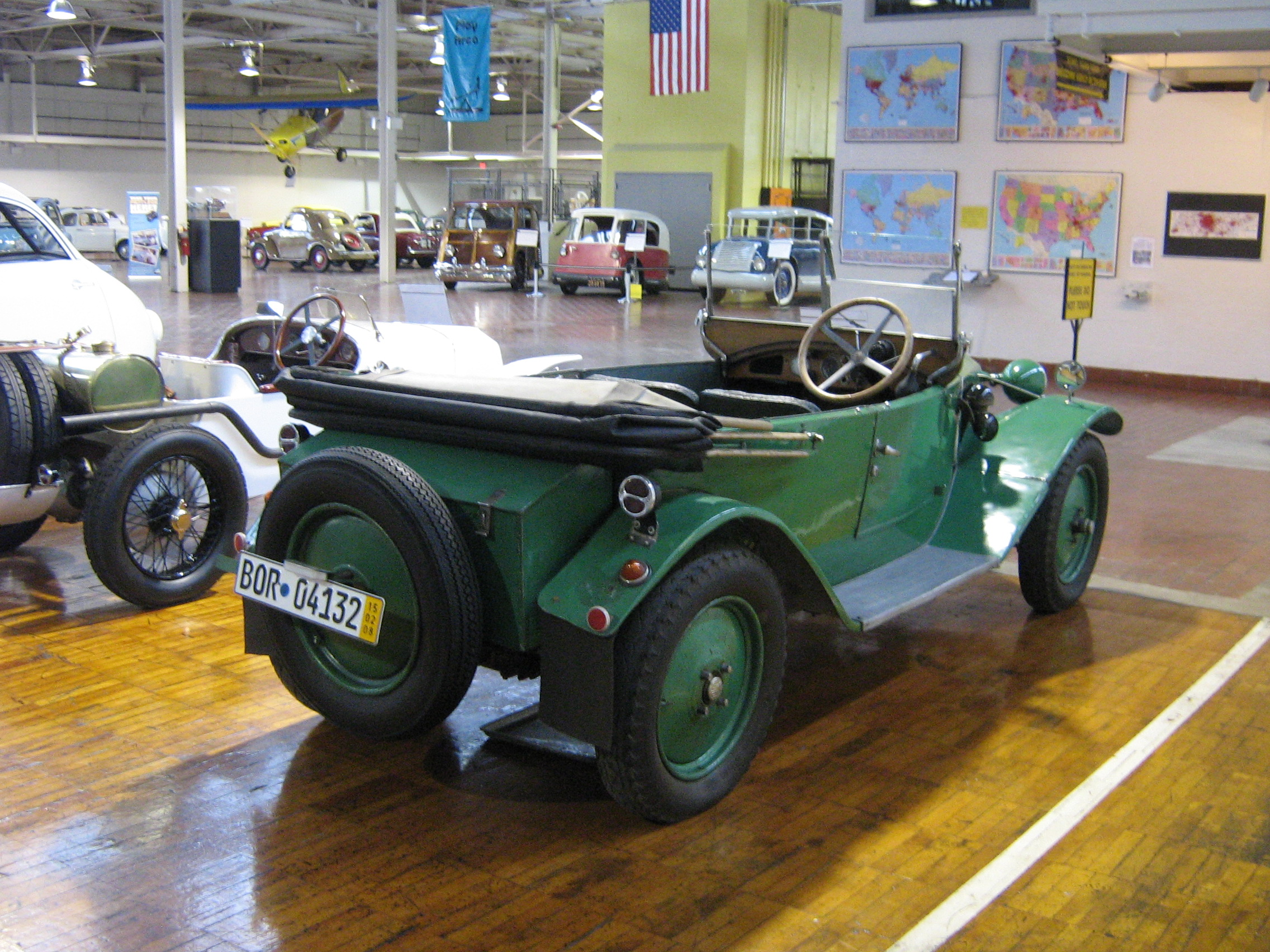 1923 Tatra T-11